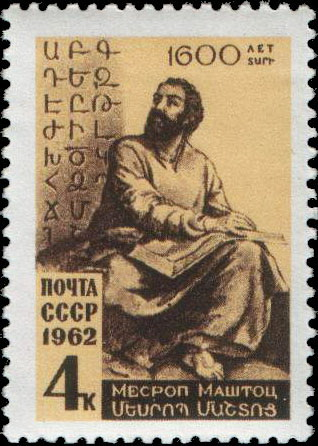 Почтовая марка СССР. 1600 лет со дня рождения Месропа Маштоца, 1962